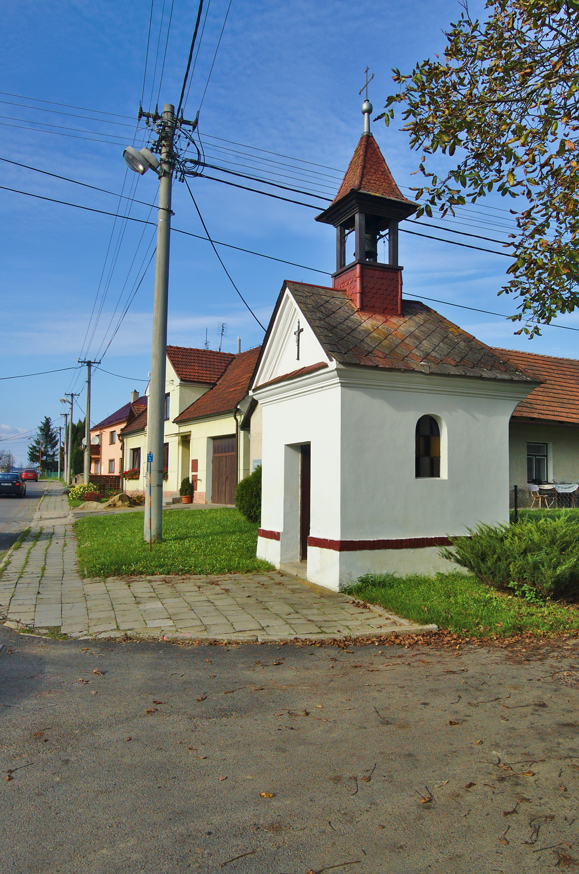 Kaple v severozápadní části obce, Štarnov, Přemyslovice, okres Prostějov